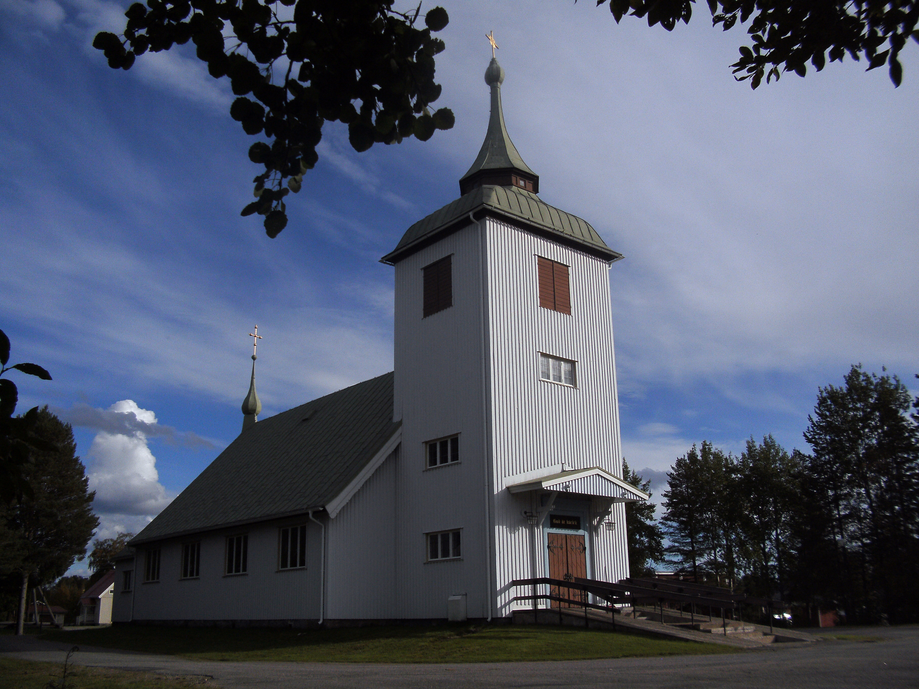 Junosuando kyrka i Pajala kommun